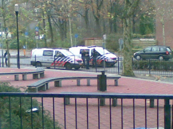 trevianum staakt